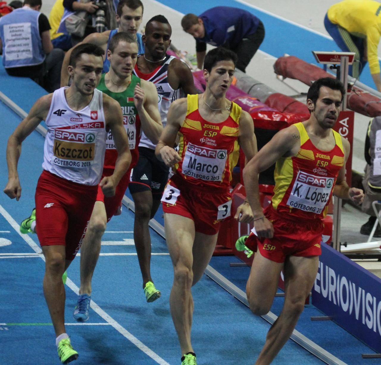 028 finale 800m